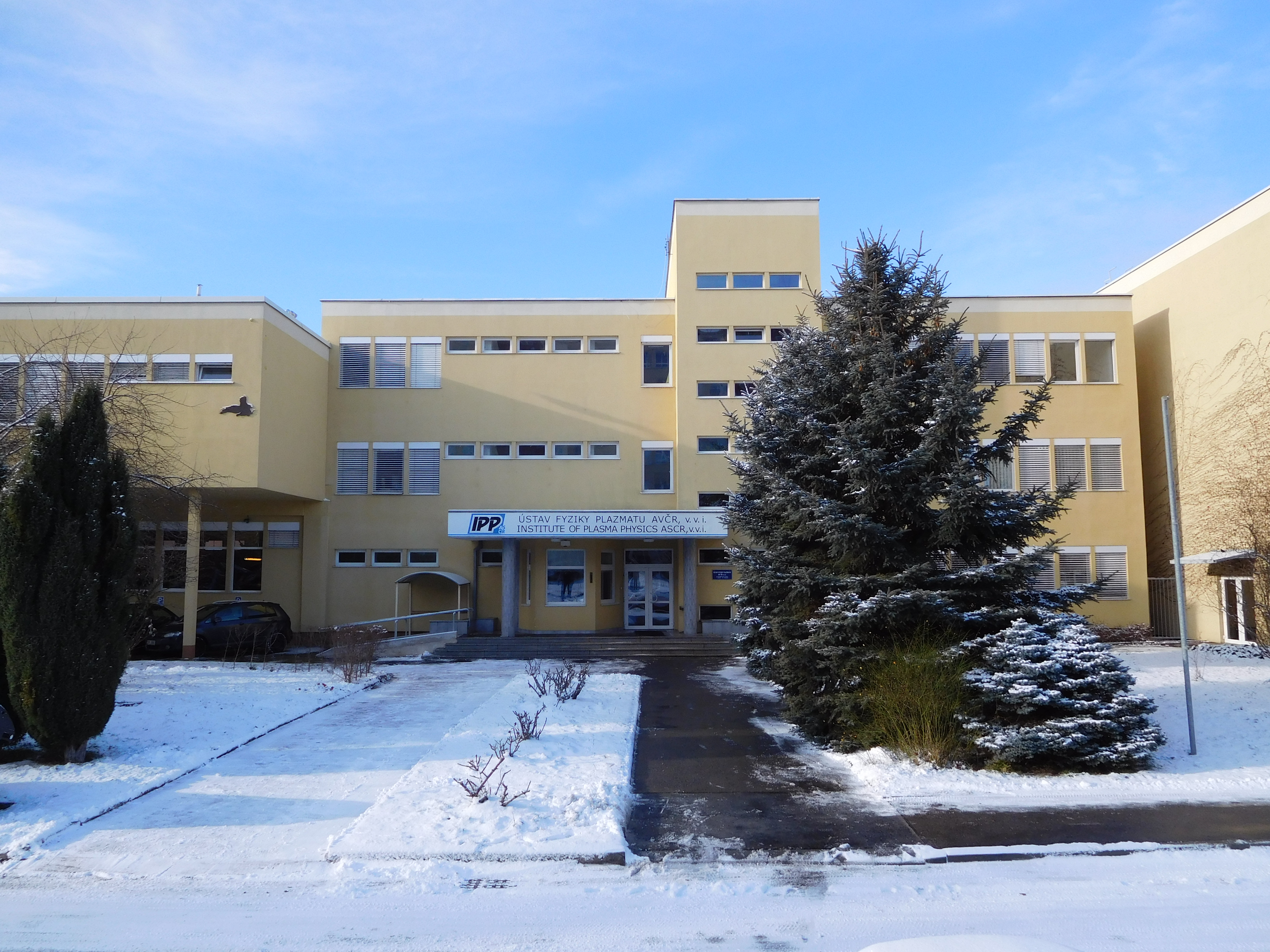 Ústav fyziky plazmatu - hlavní budova